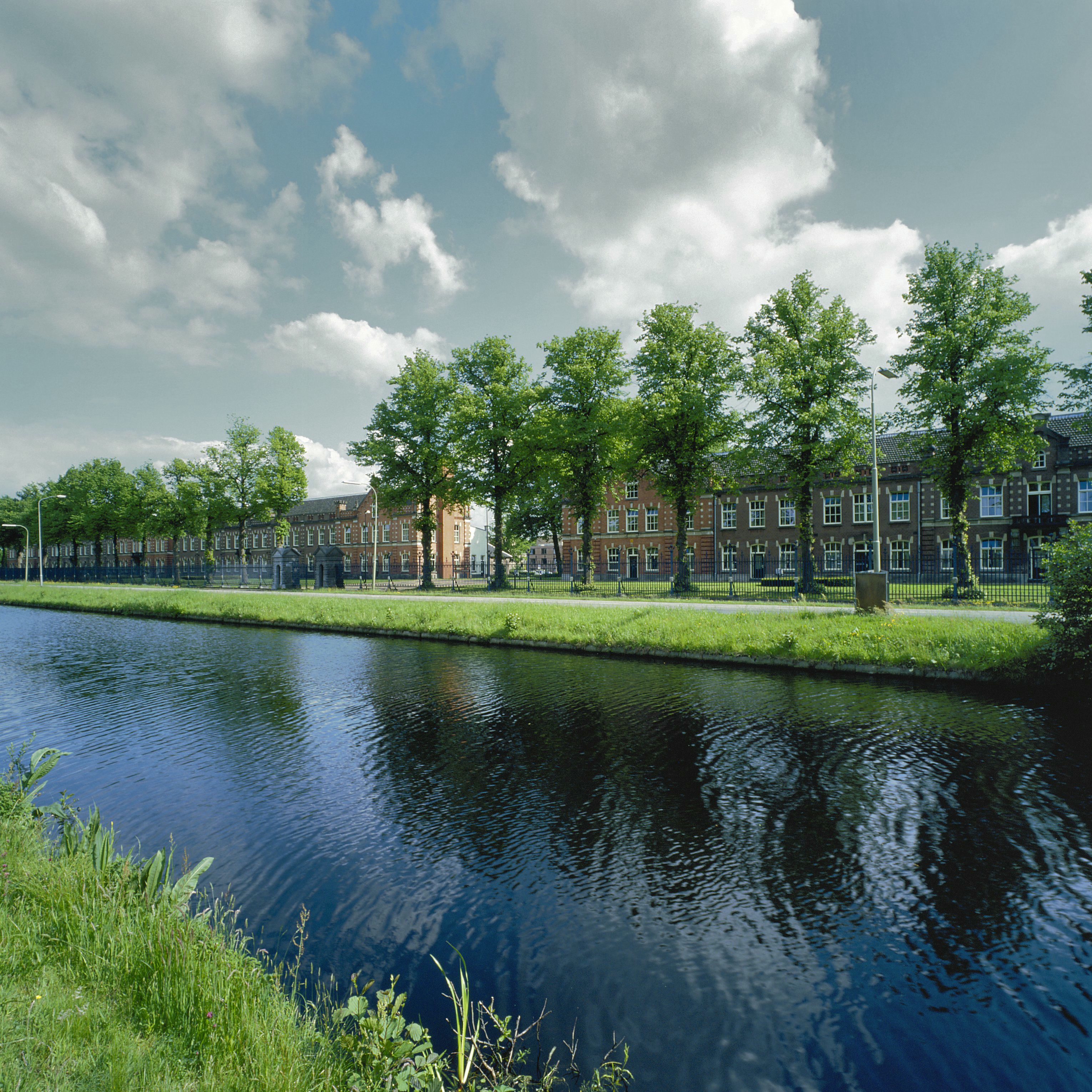 Johan Willem Frisokazerne: Overzicht over het water (opmerking: Gefotografeerd voor ANWB Monumentenboek)